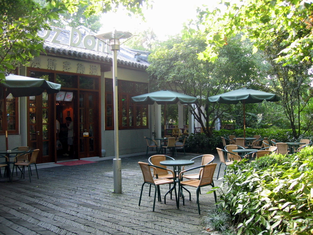 Hangzhou Xihu Tiandi Restaurant 杭州 西湖天地